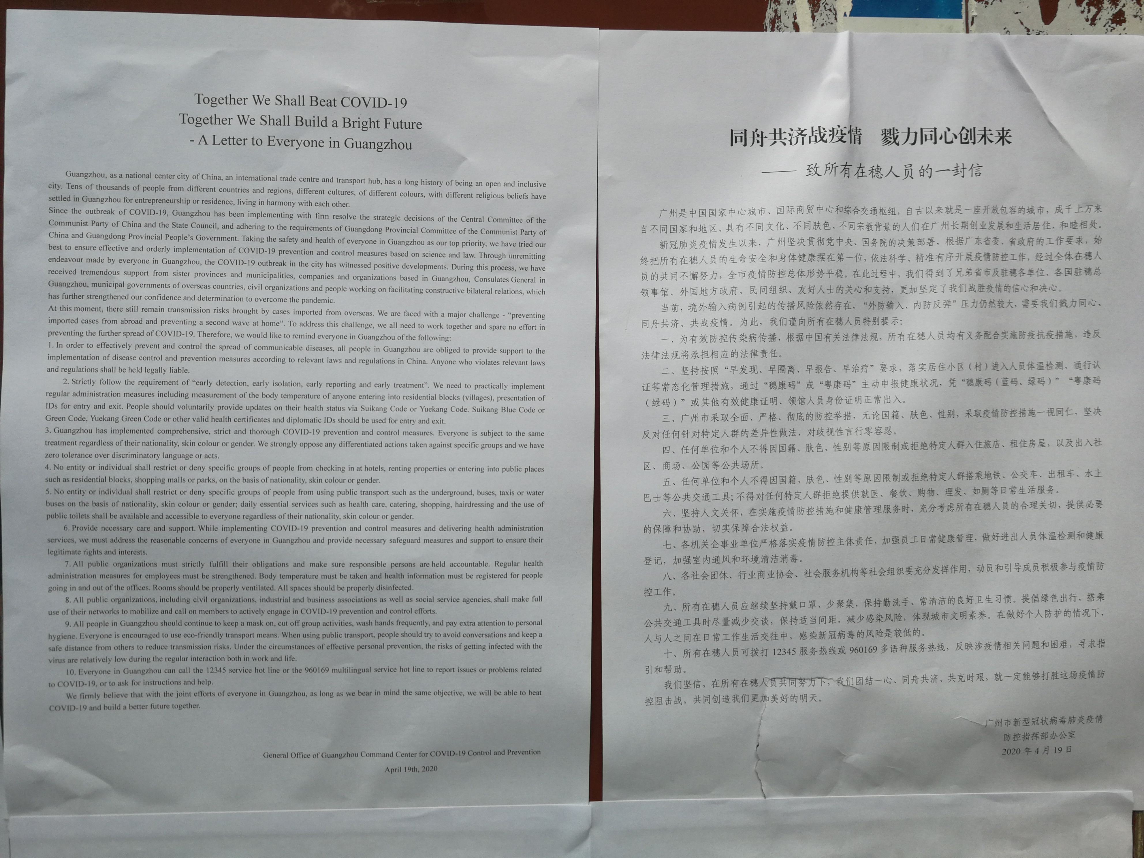 中文（中国大陆）: 2019冠状病毒病（新型冠状病毒肺炎）广州疫情期间的一封公开信《同舟共济战疫情 戮力同心创未来——致所有在穗人员的一封信》